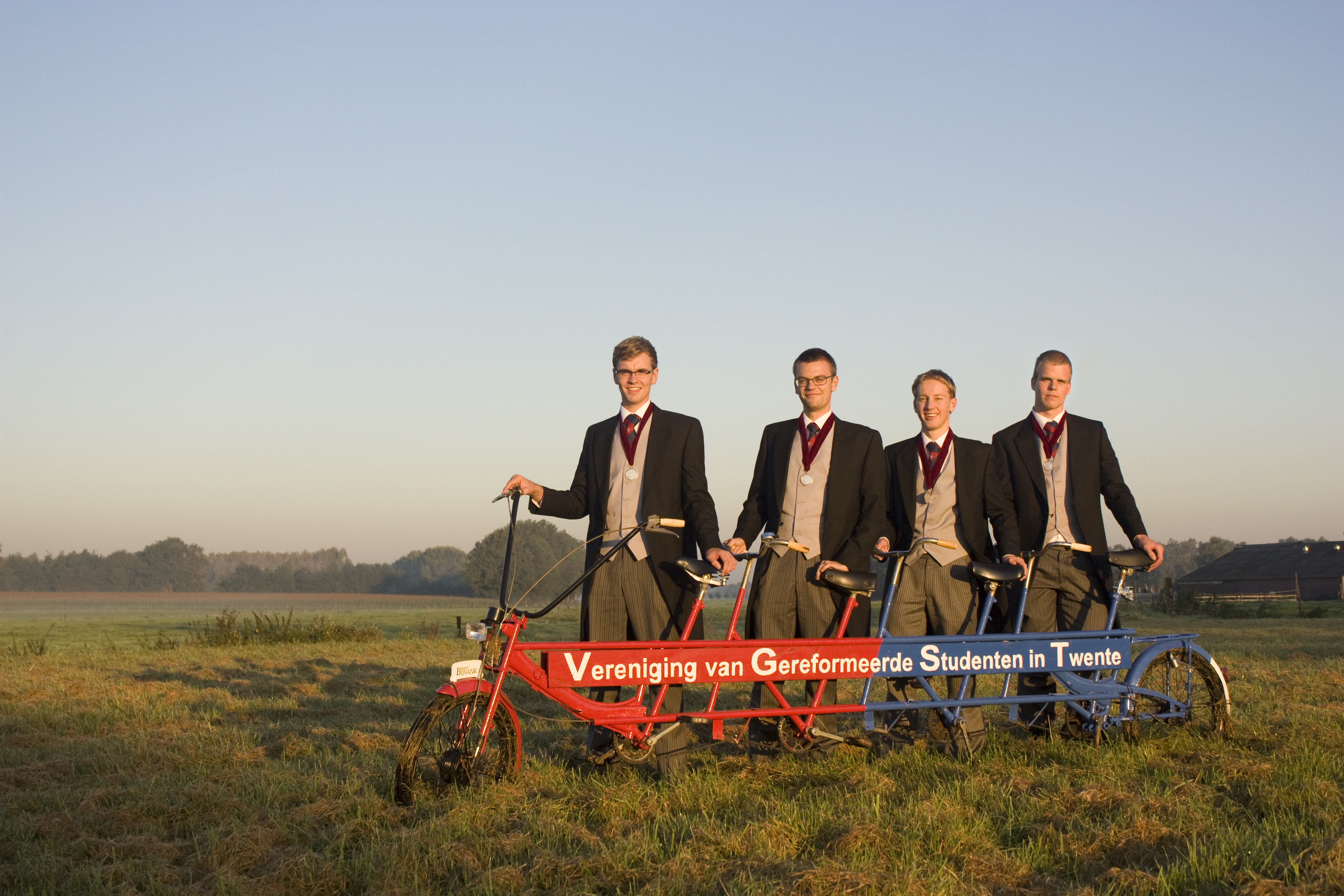 Senaat Bijvank met de Viets